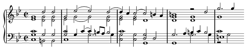 Premières mesures de la Pavana de Byrd, Fitzwilliam Virginal Book n° 167